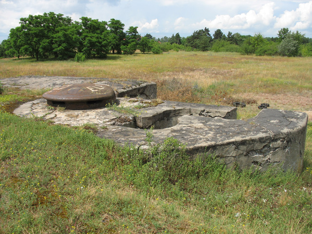 KOPUŁA OBSERWACYJNA P.B.St 96 (L.) (bateria półpancerna SLB), Skansen Fortyfikacji Pancernej Twierdzy Toruń